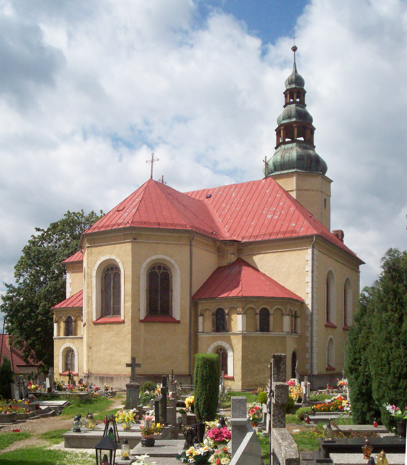 Chmieleń, kościół pw. św. Mikołaja.